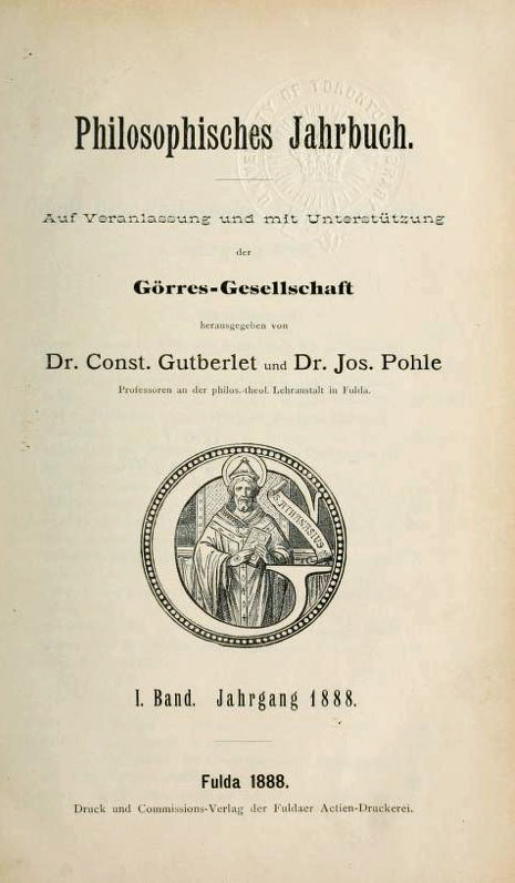 Philosophisches Jahrbuch Heft 1 des 1. Jahrgangs (1888) Titelblatt.jpg